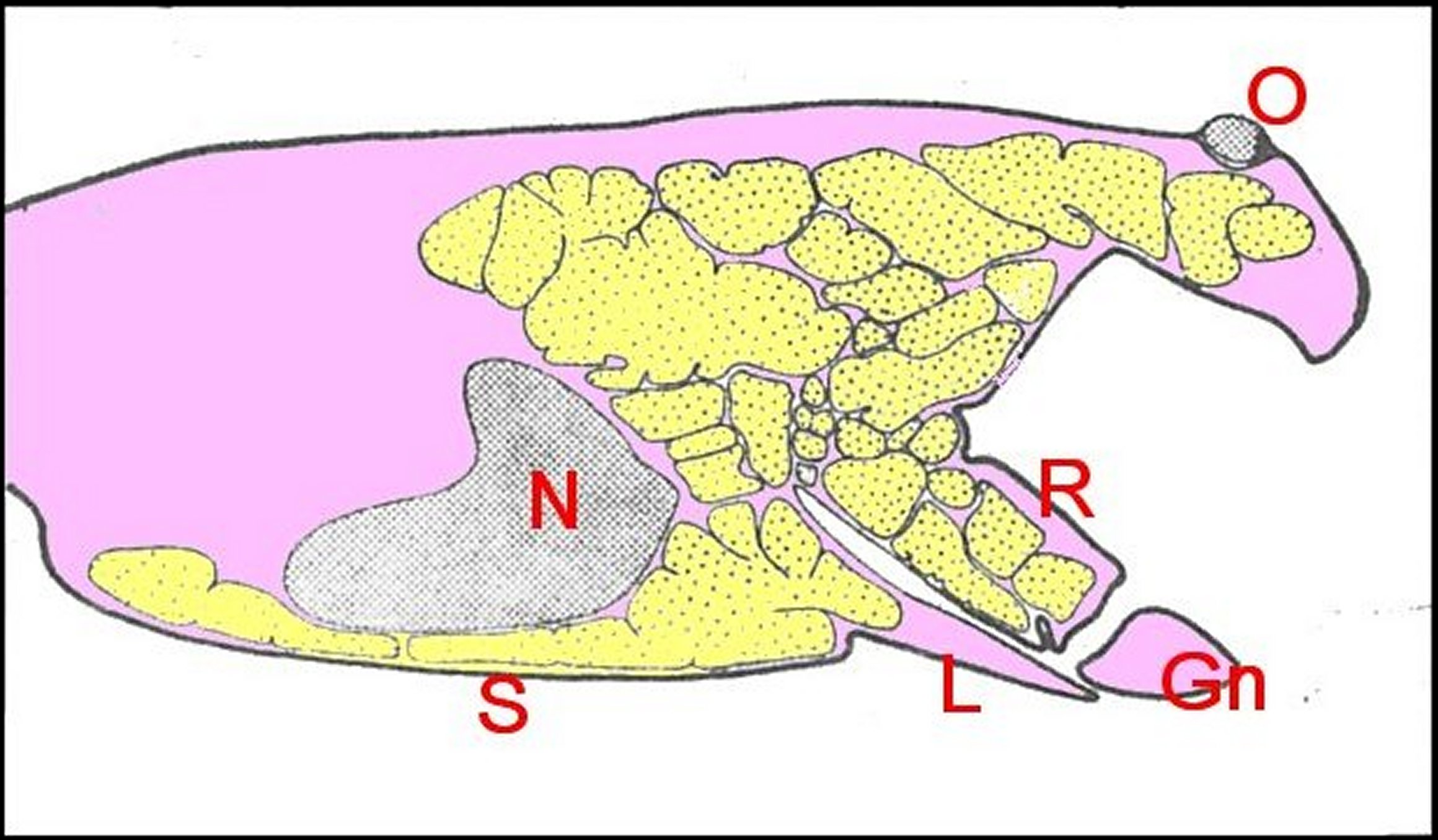 Plectreurys, glande à venin, schéma d'une coupe histologique sagittale du céphalothorax